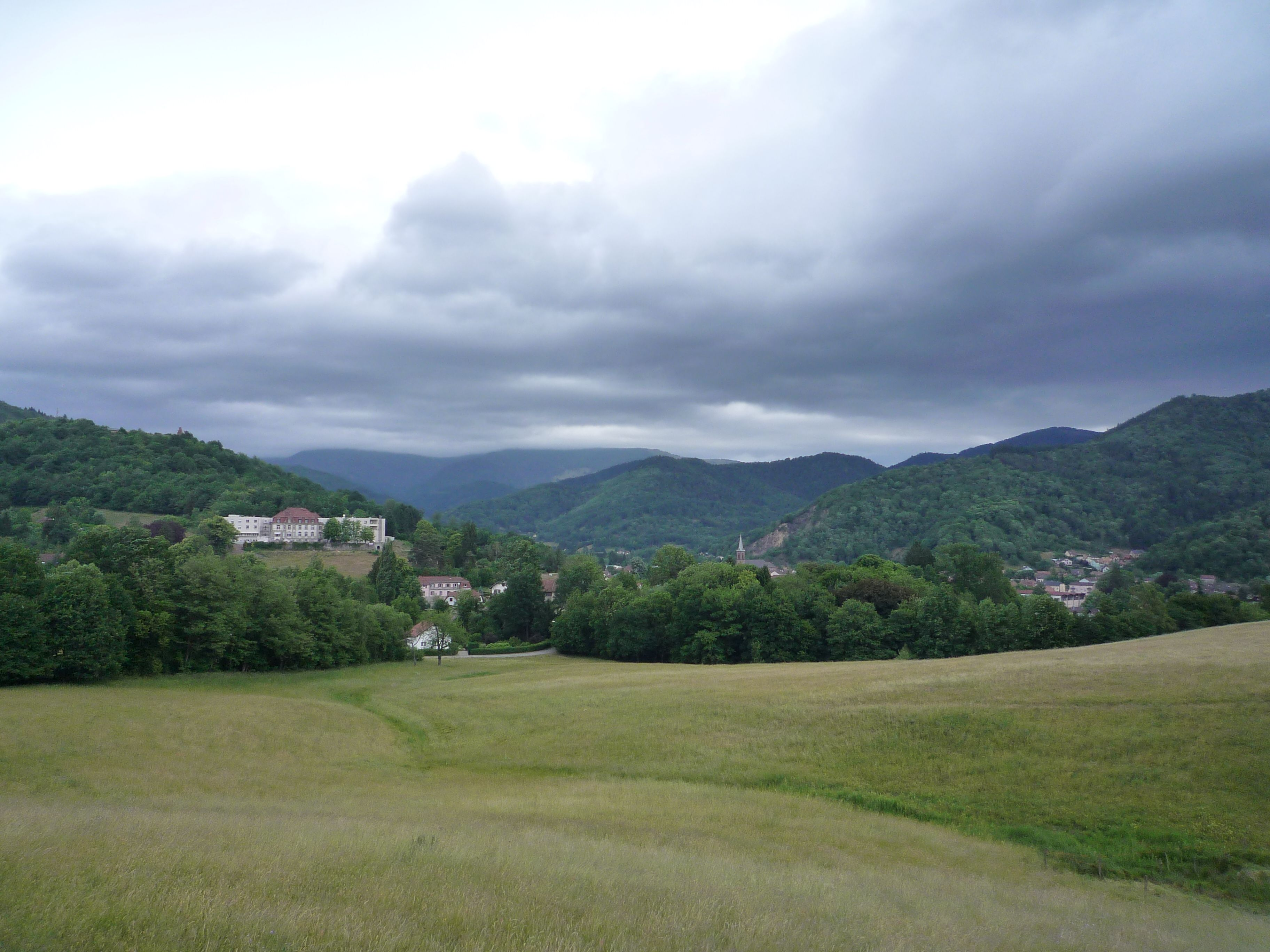 20110531 01 Col du Hundsrück